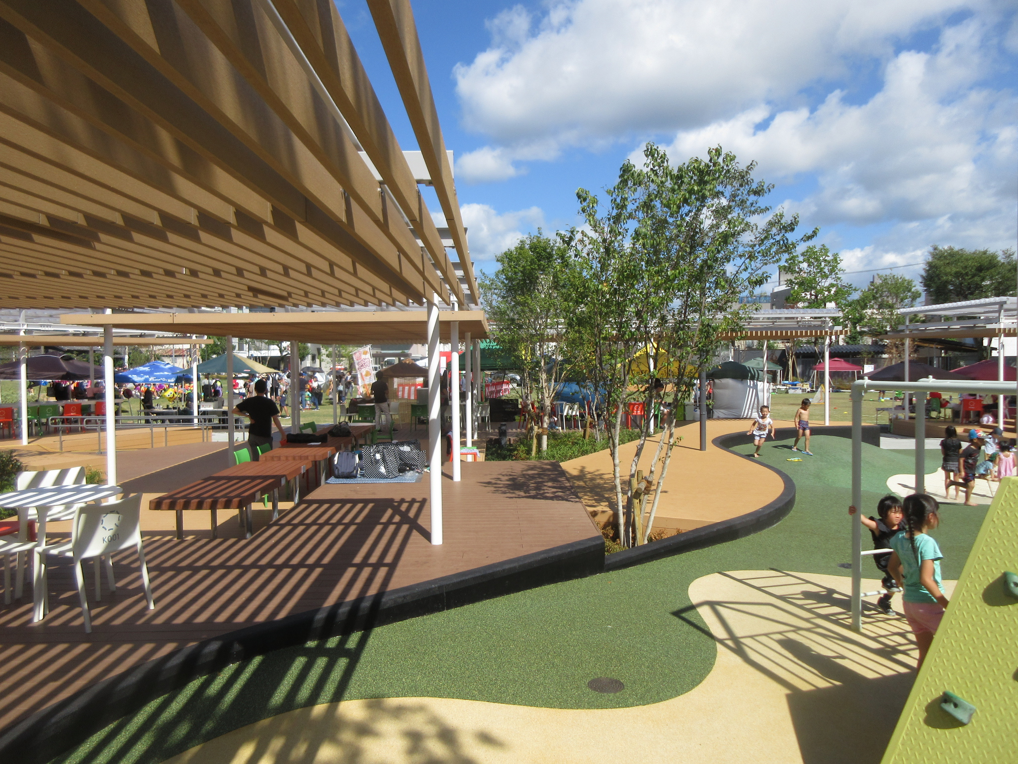 新しく整備された籠田公園（2019年8月撮影）